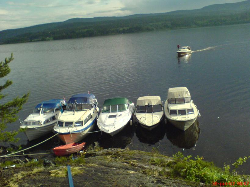 Båtliv på Rovøya, Storsjøen, Odalen